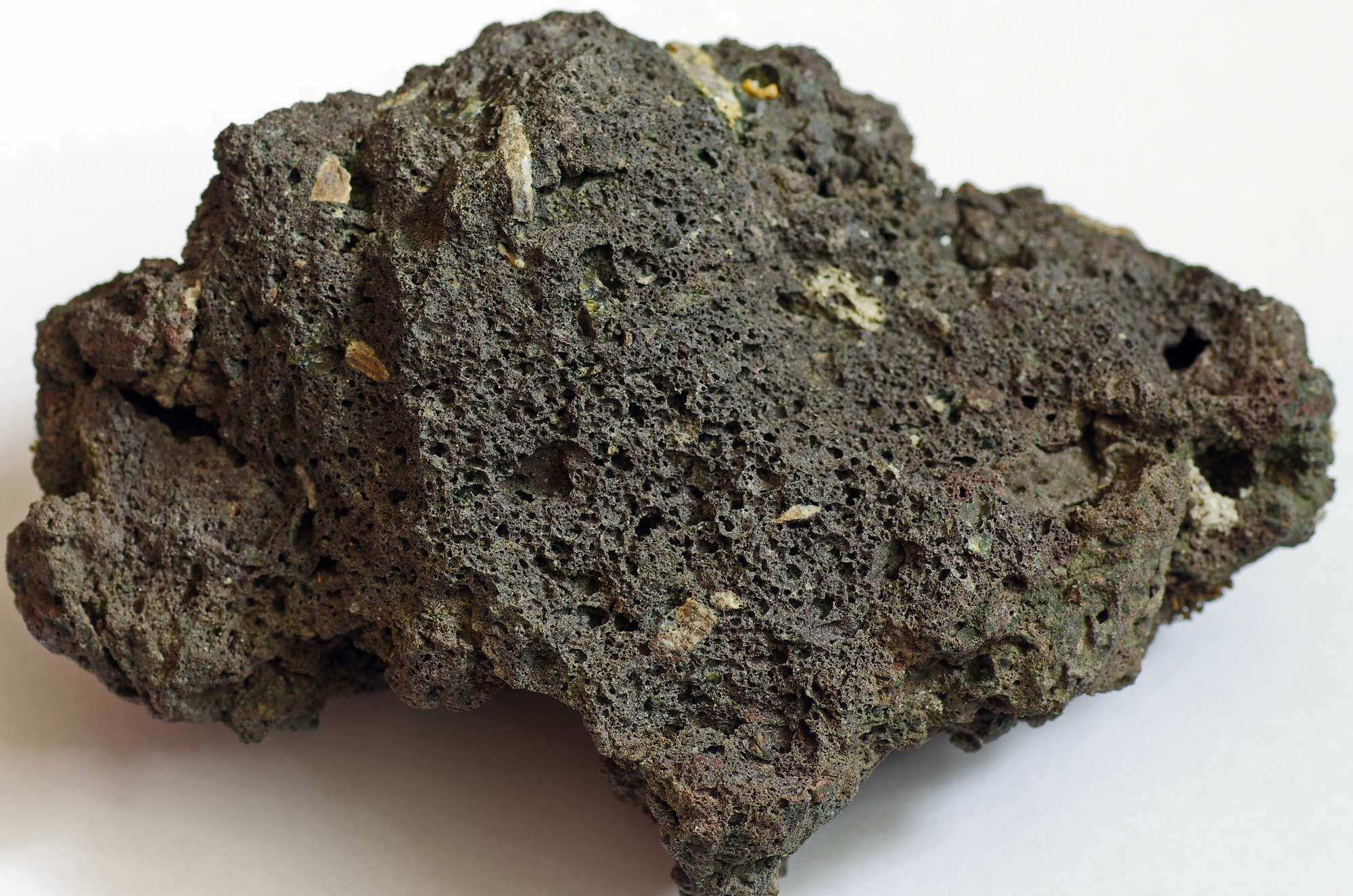 Národní přírodní památka Železná hůrka v okrese Cheb, vzorek sopečné strusky